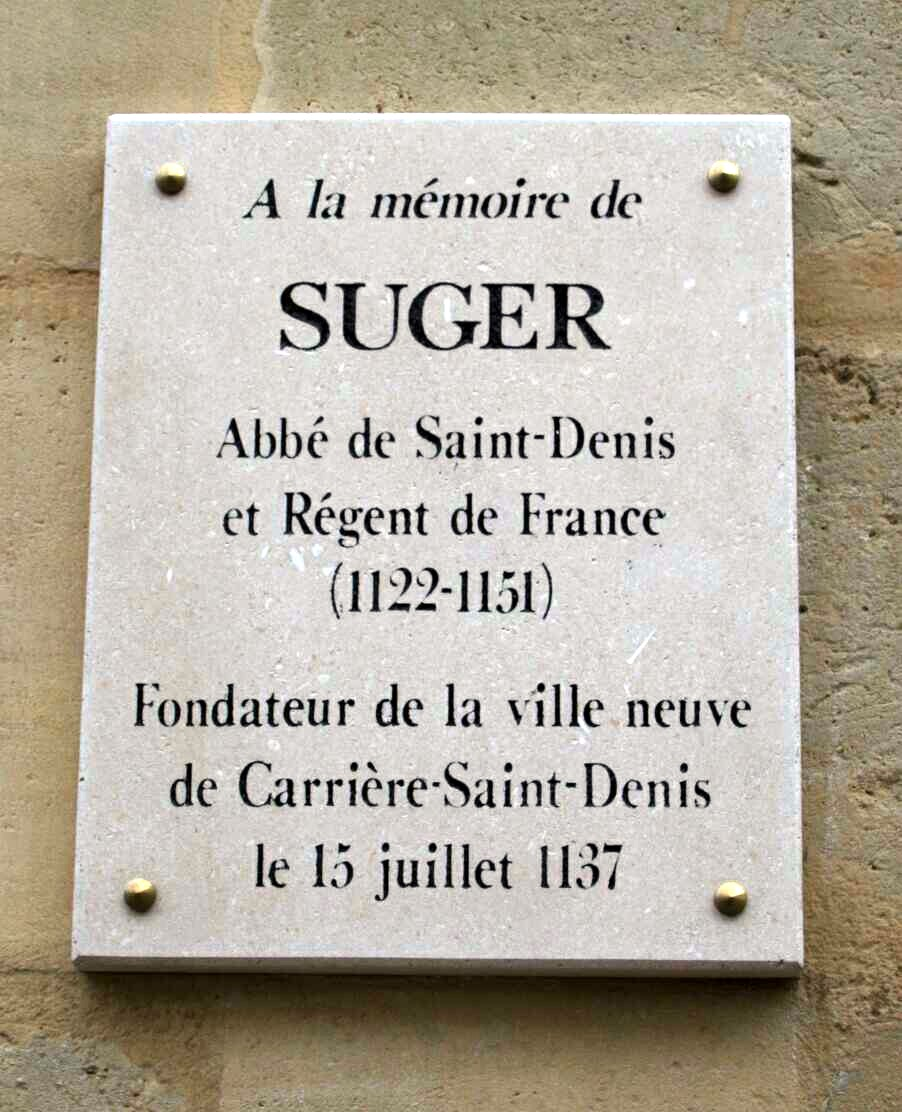 Plaque à la mémoire de Suger, fondateur de Carrières-sur-Seine - Yvelines (France).